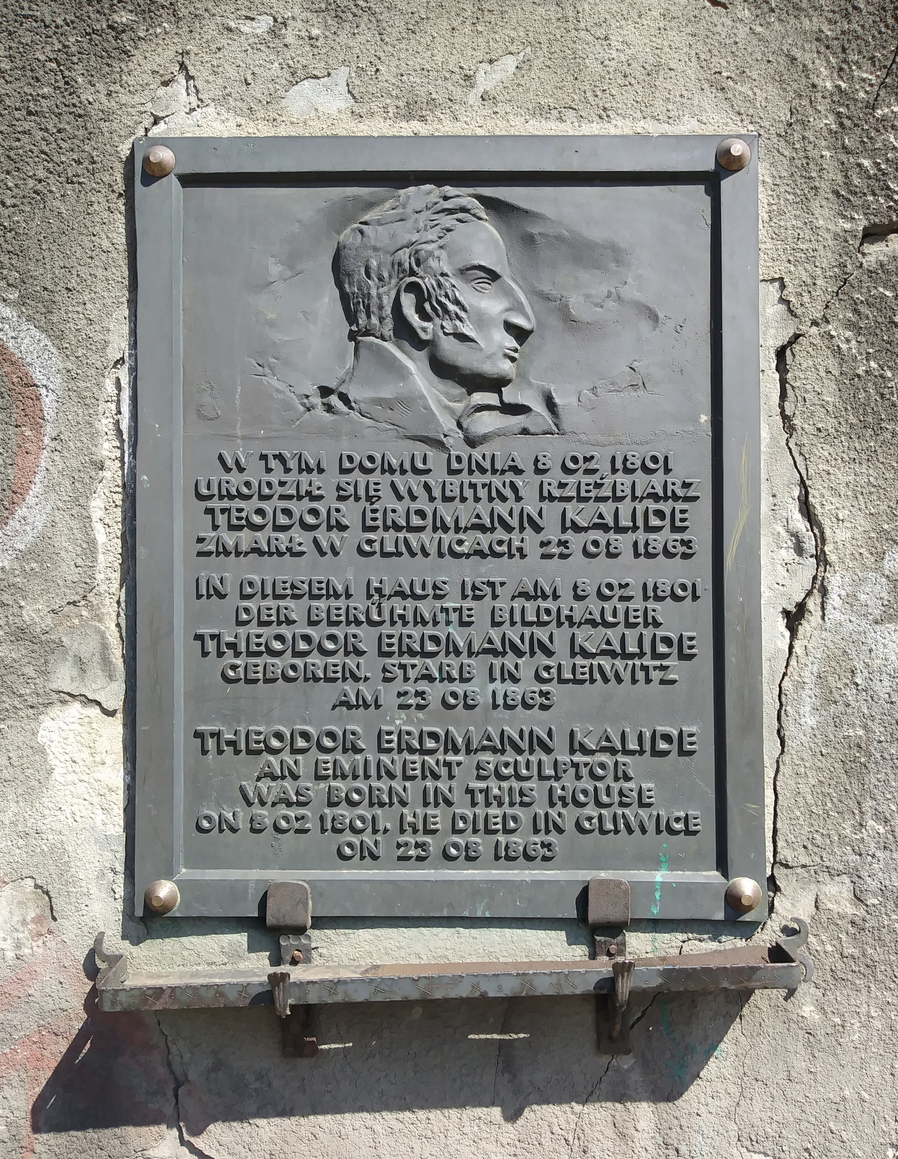 tablica na domu rodzinnym Teodora Erdmanna Kalidego w Chorzowie, ul. Kalidego 1, od strony ul. 3 Maja